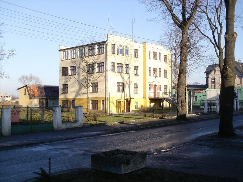 Urząd gminy.